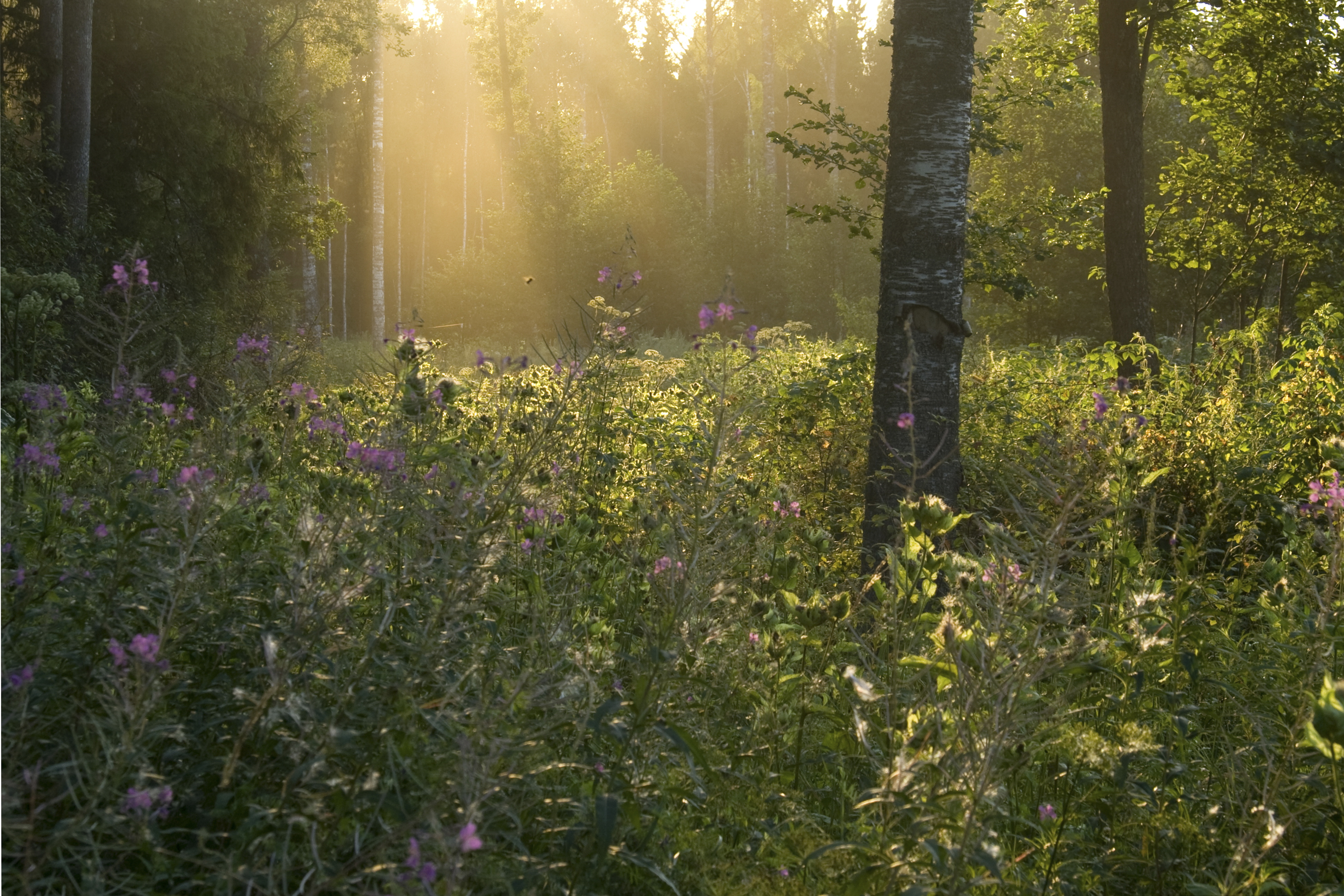 Õhtused päikesekiired Kõrvemaa MKA metsaservas